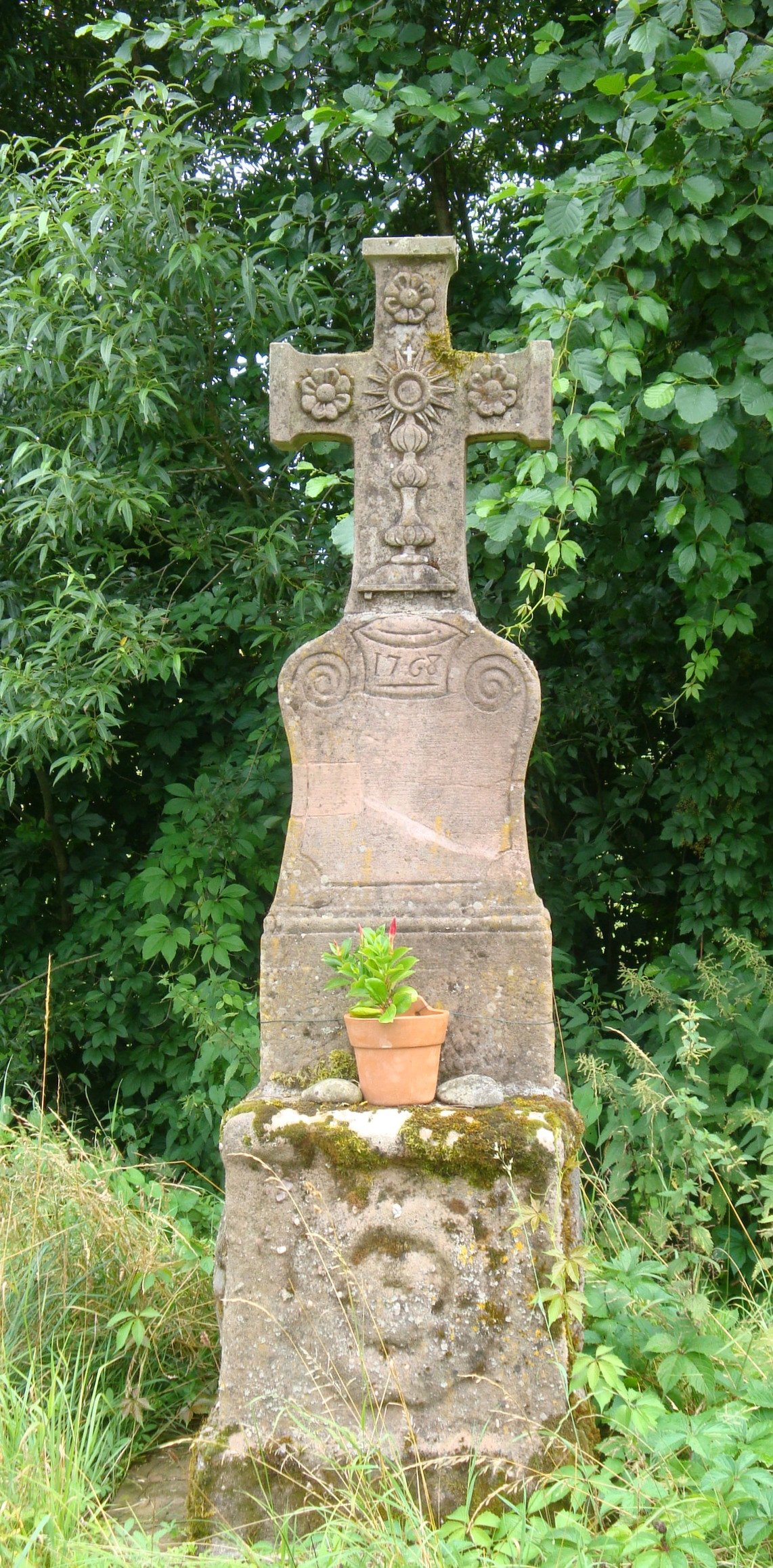 St MICHEL_calvaires